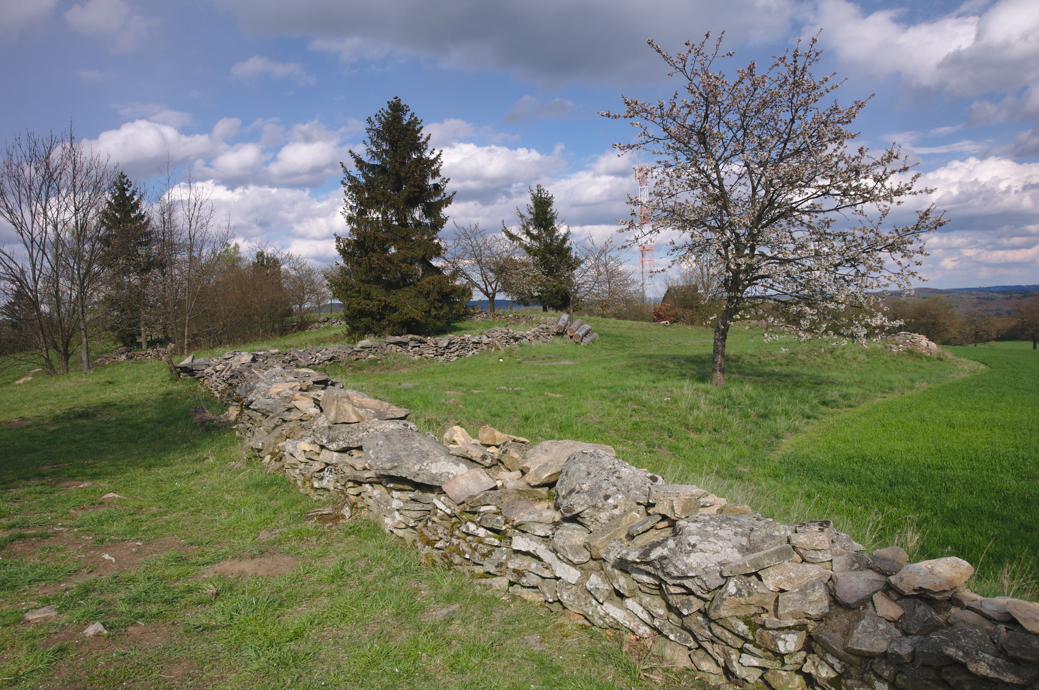 Veselský chlum, okres Brno-venkov